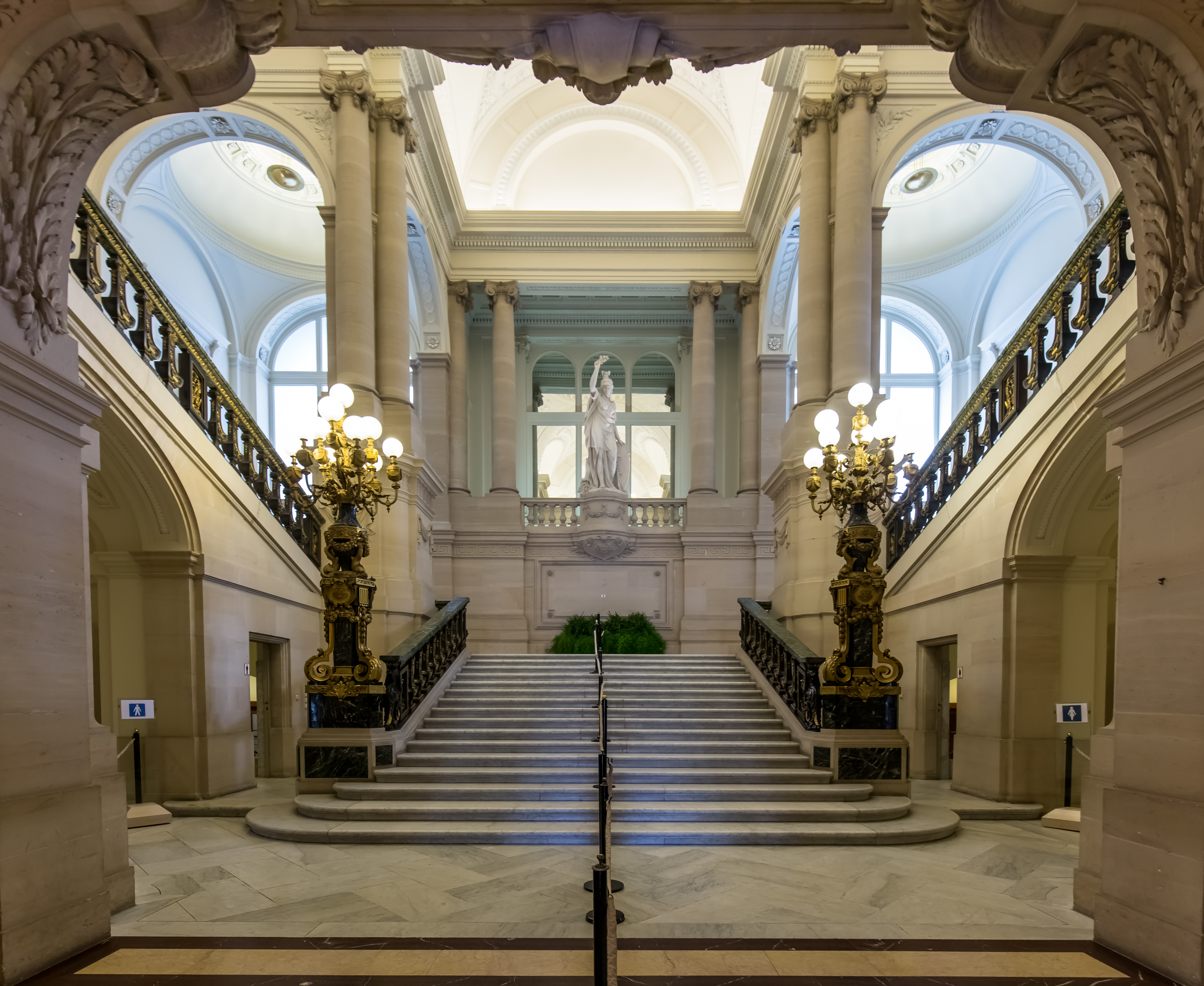 Schodiště v královském paláci v Bruselu